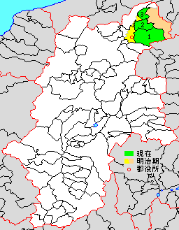 長野県下高井郡の位置